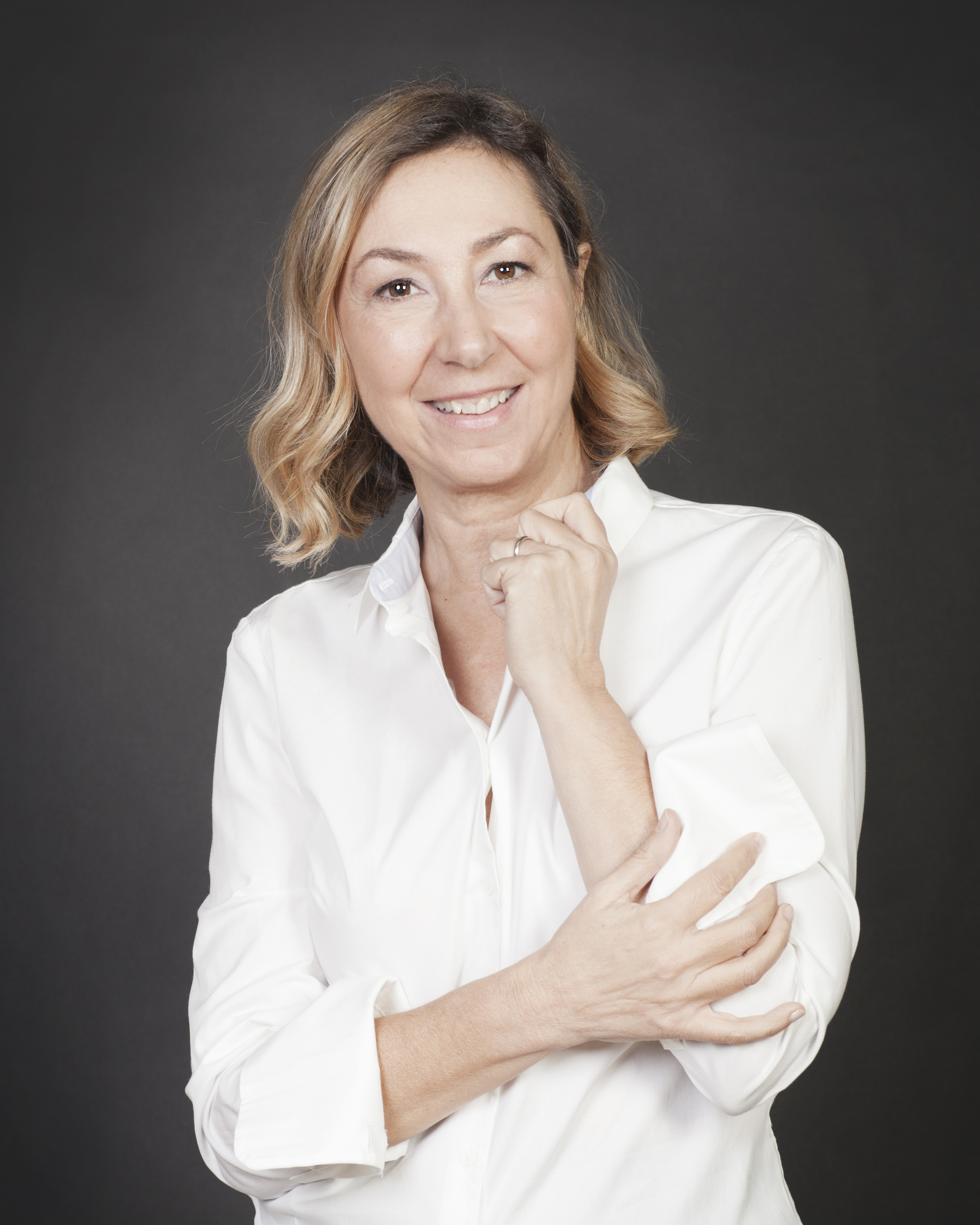 Barbara Enrichi